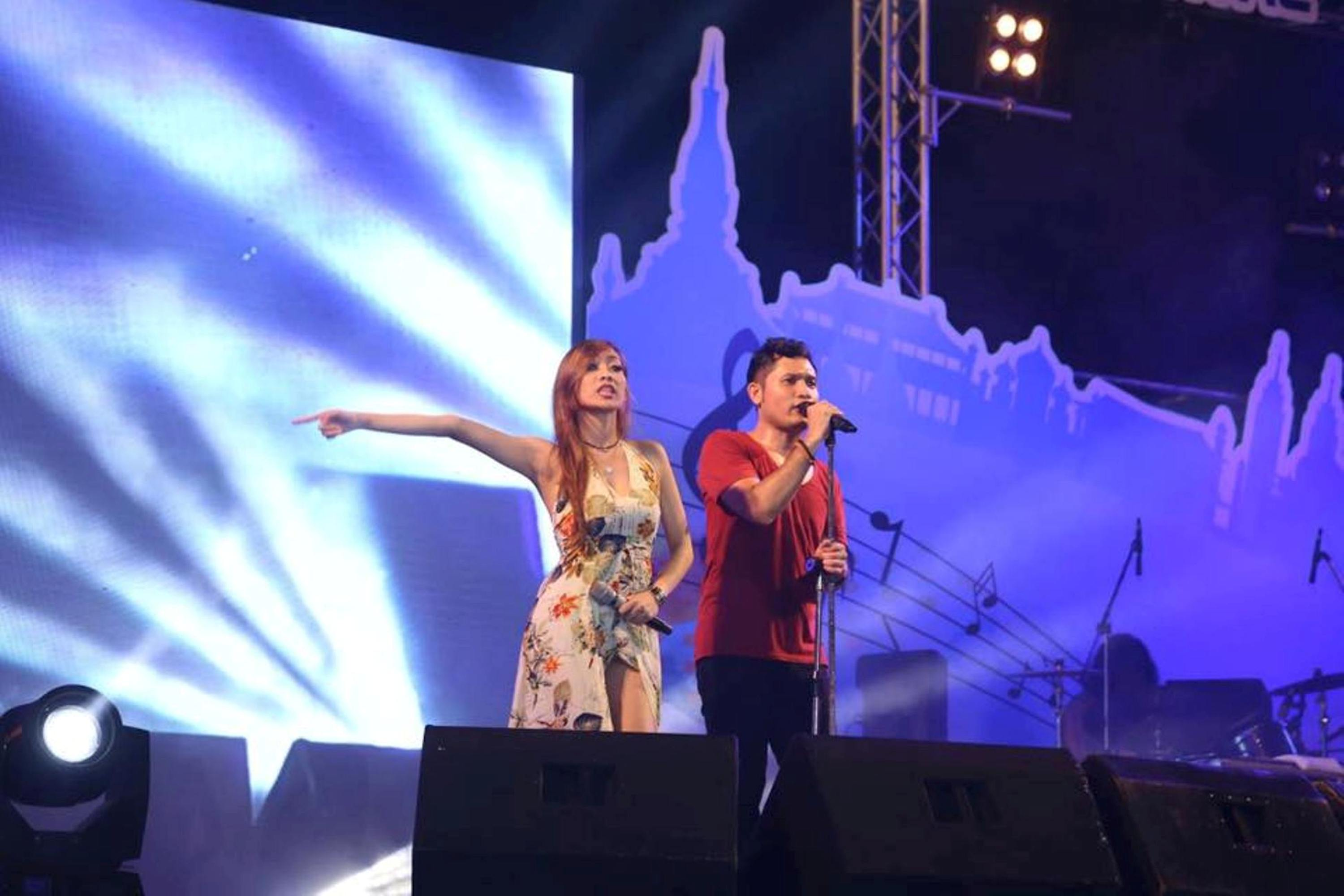 Oza Kioza berduet dengan Andra and the BackBone menyanyikan 'Sempurna' dalam acara ASEAN Plus Music and Culinary Festival di Vientiane, Laos pada 13 November 2016.